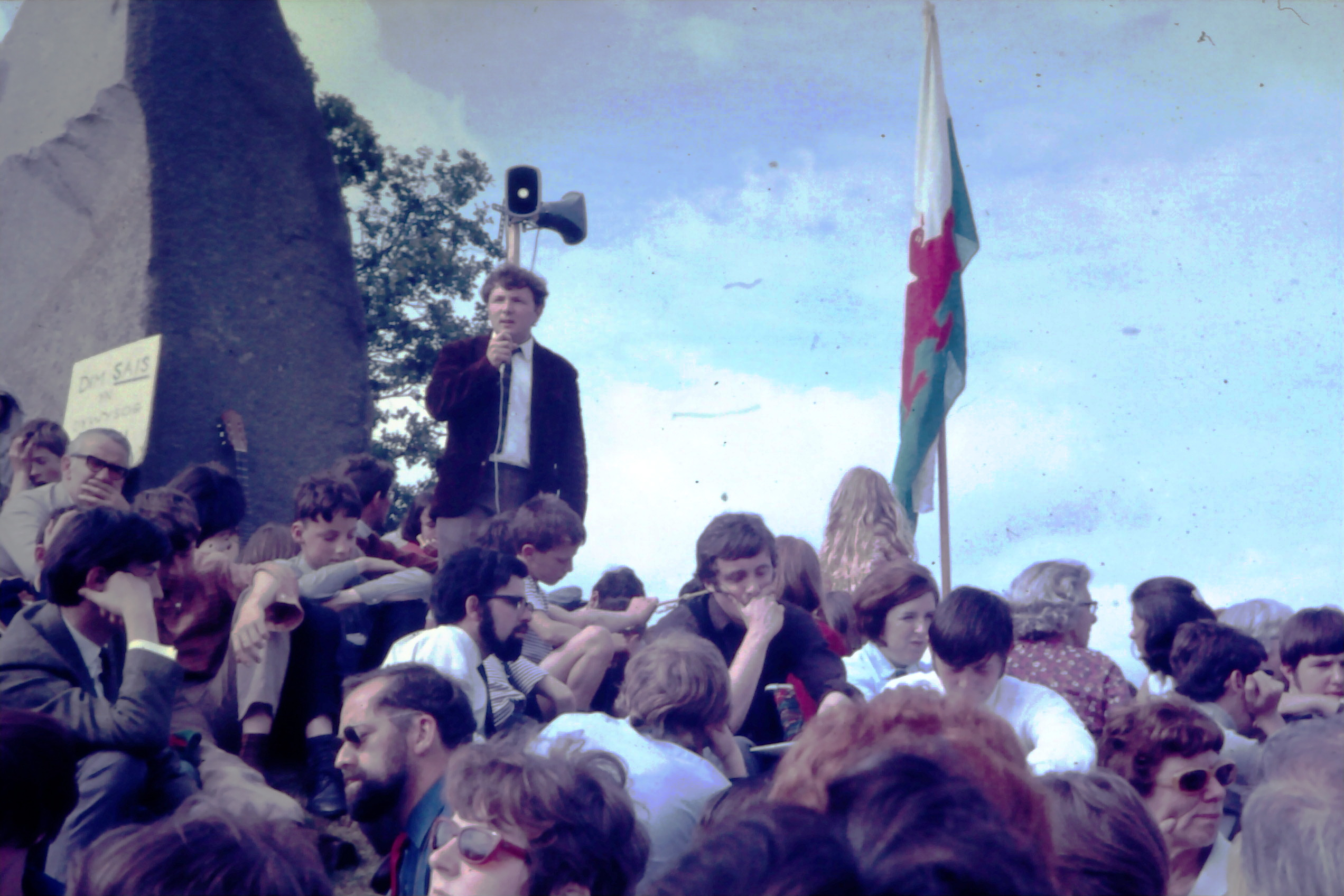 Protest yng Nghilmeri yn erbyn yr arswisgiad.